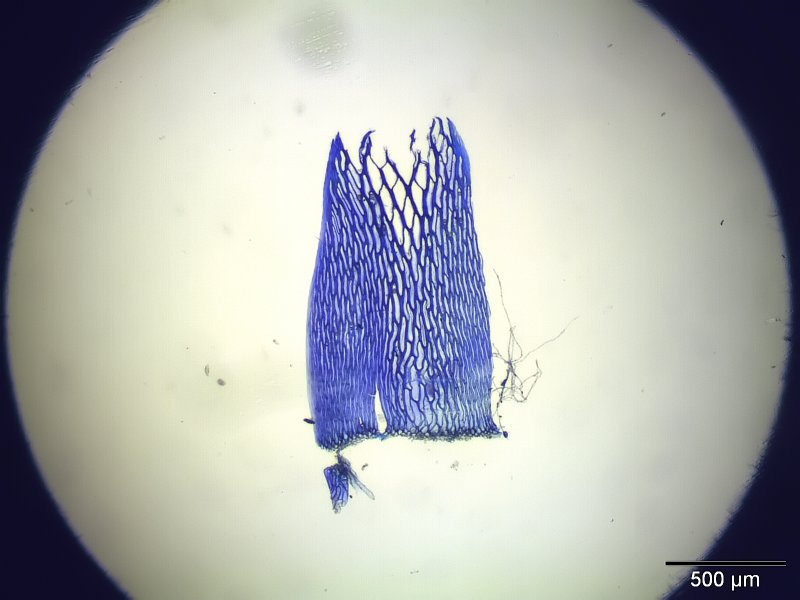 Ufer-Torfmoos (Sphagnum riparium), Stammblatt, Vergrößerung: 40x